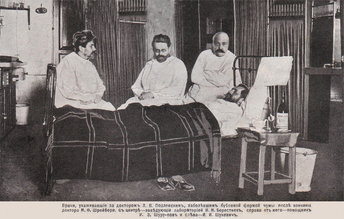 Противочумная лаборатория Форта Александр I. Врачи, ухаживающие за заболевшим Л. В. Подлевским. В центре М. Н. Берестнев, слева от него И. З. Шурупов и слева И. И. Шукевич.